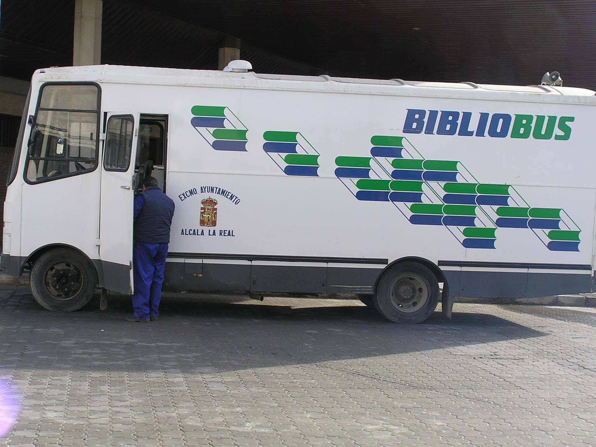 Biblioteca móvil en Alcalá la Real, provincia de Jaén, España.